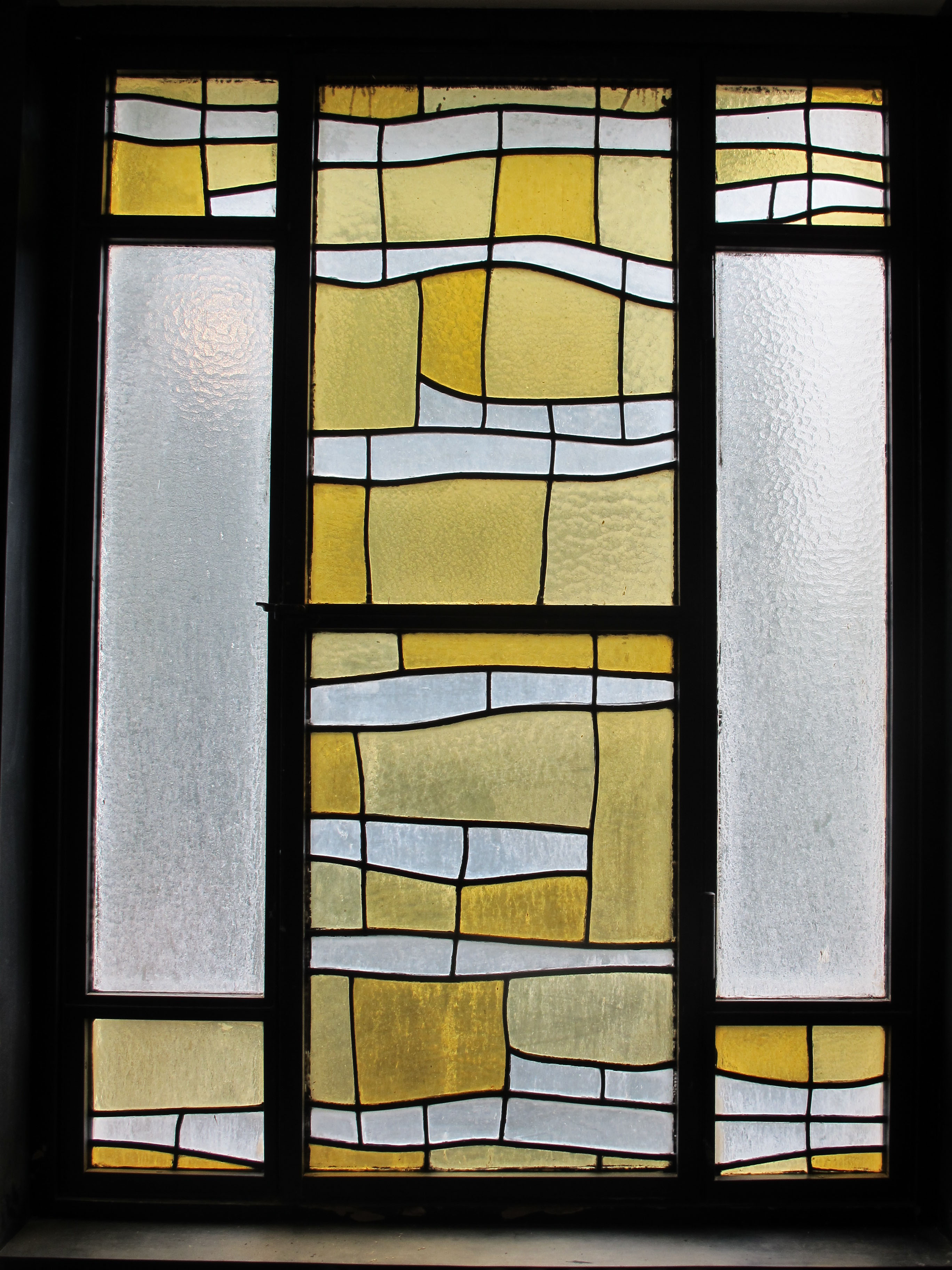 Vitrall de Fornells-Pla, a la casa de l'artista, actualment seu de la fundació Fornells-Pla i Conxa Sisquella